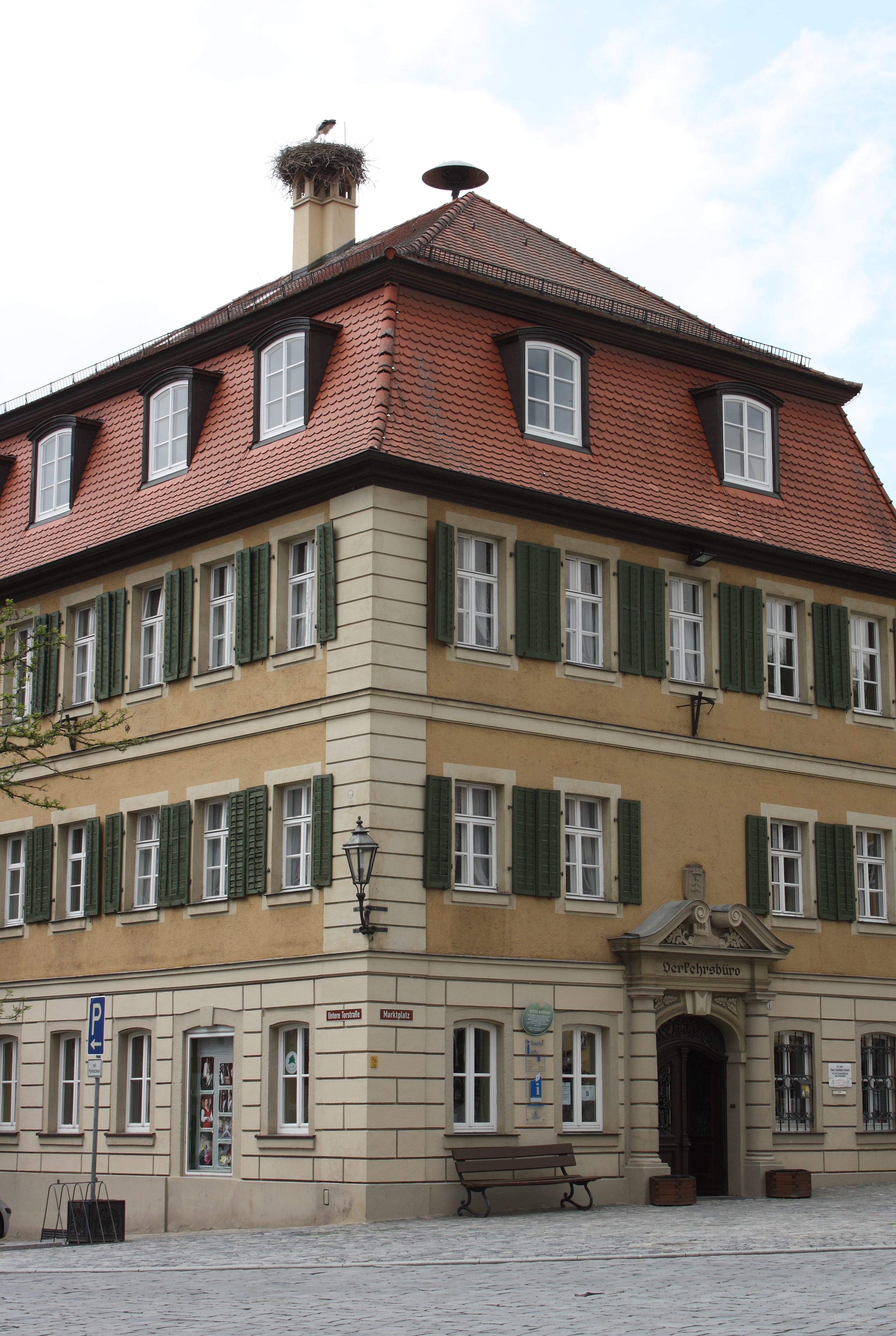 Altes Rathaus in Feuchtwangen im Landkreis Ansbach (Bayern), Marktplatz 1